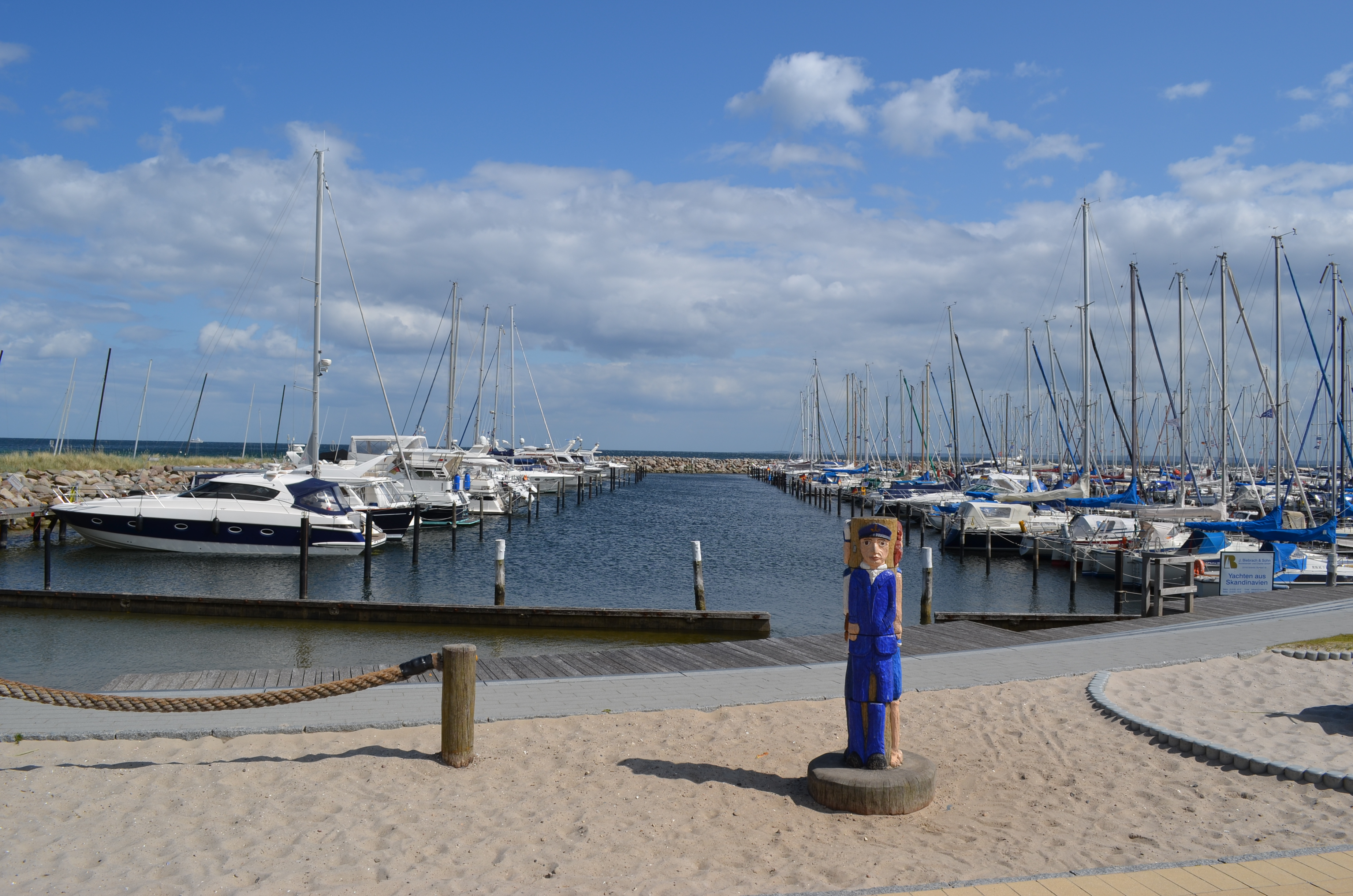 Grömitz, der Hafen 7